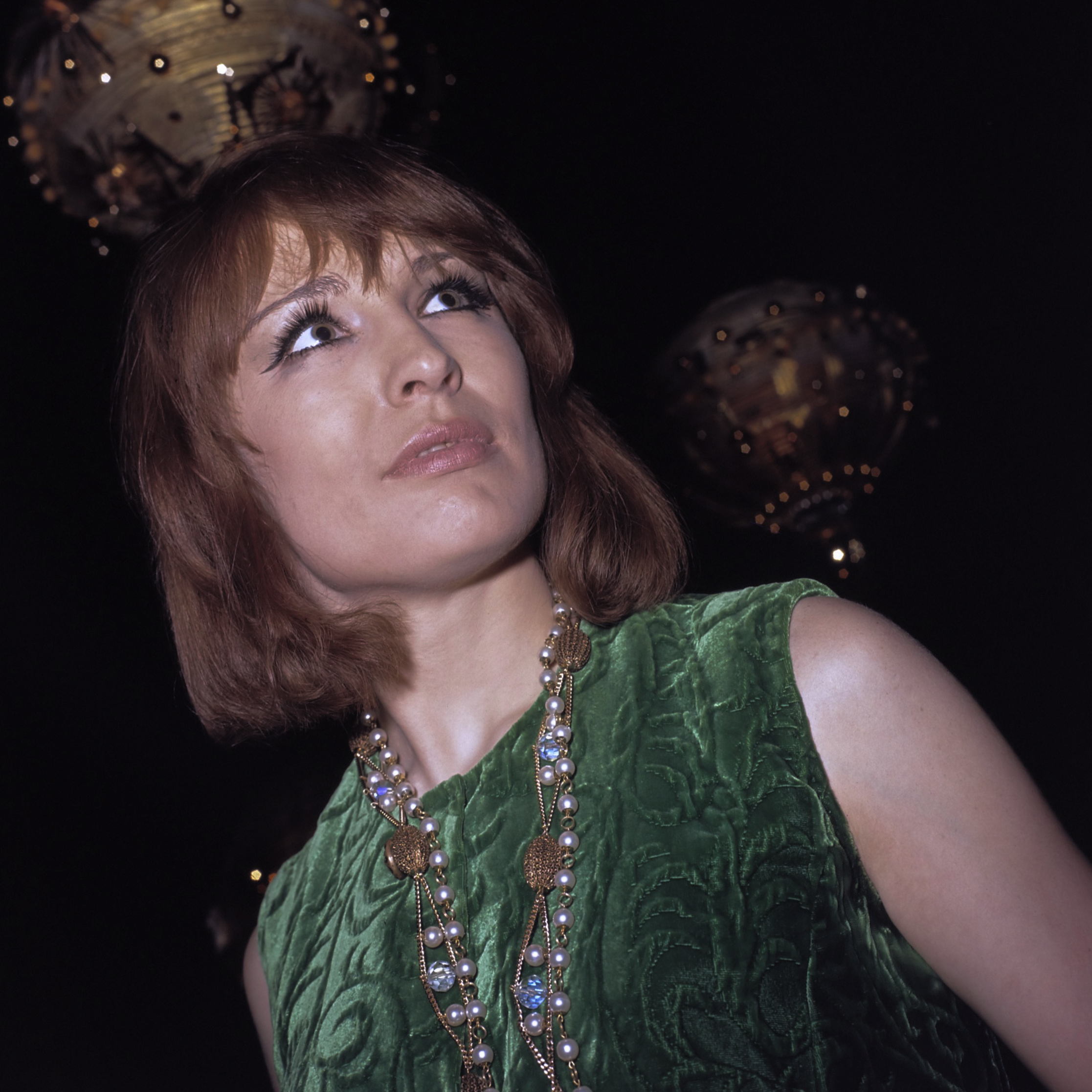 Liesbeth List